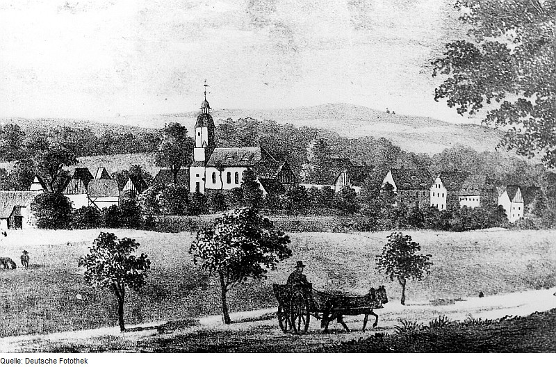 Original image description from the Deutsche Fotothek Wermsdorf-Lampersdorf. Ortsansicht vom Windmühlenhaus aus